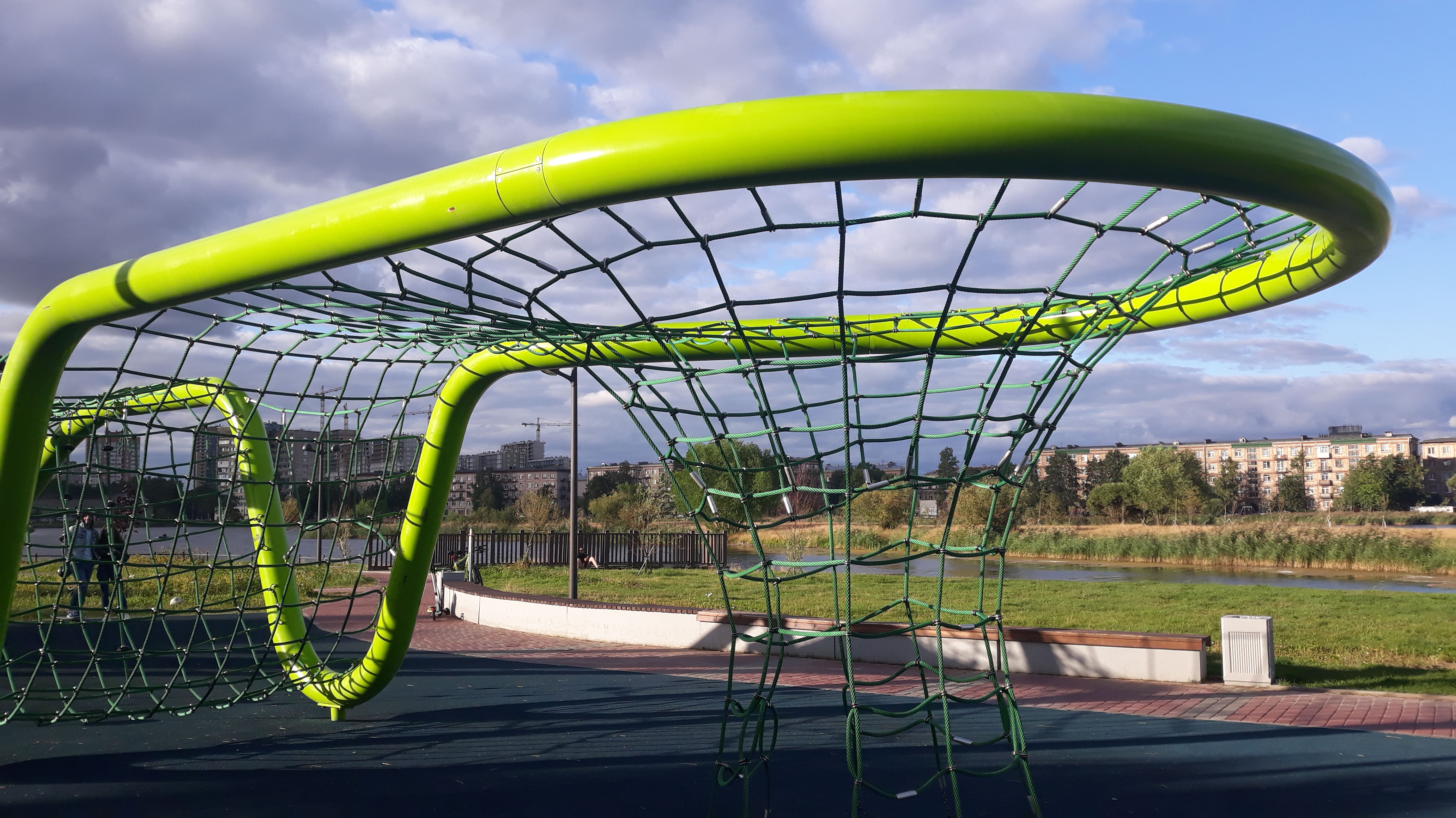 Санкт-Петербург. Ивановский карьер. Детская площадка